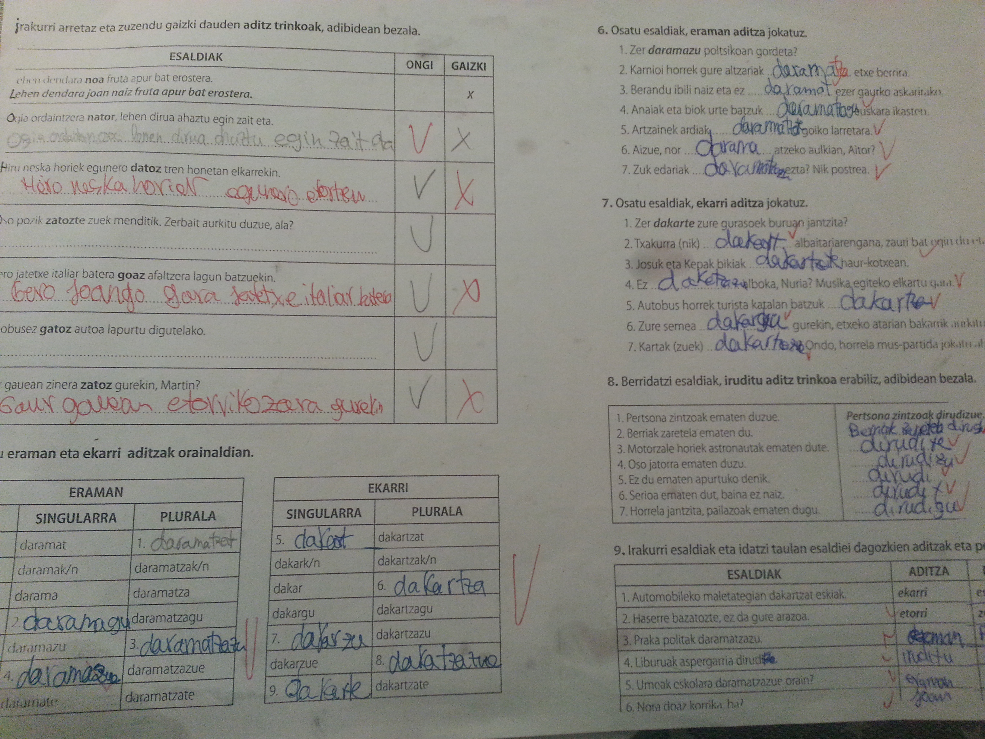 2019. urtean D ereduko ikastetxe publiko batean "etxeko lan" bezala agindutako fitxa.